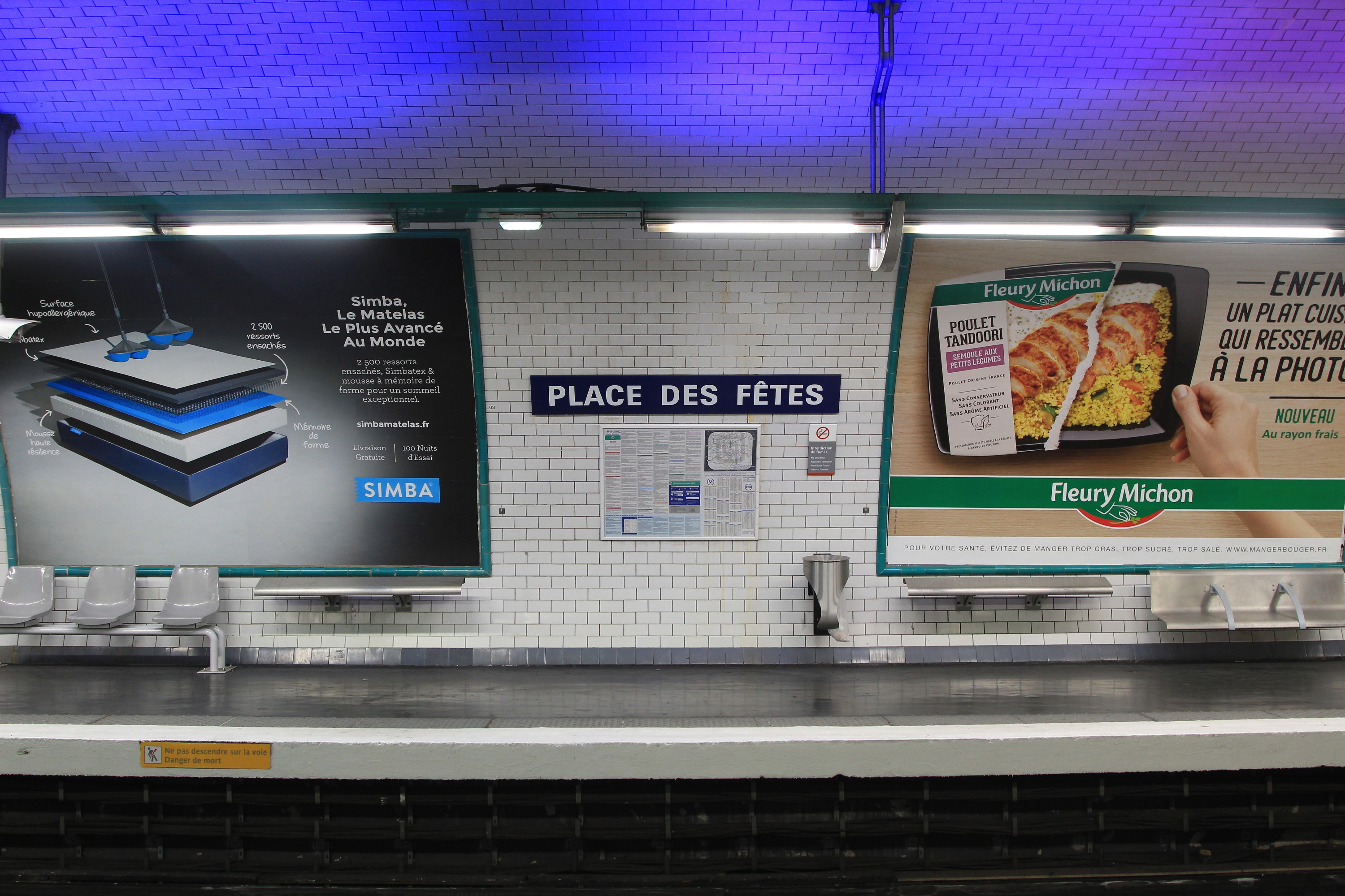 Quai de la station de métro parisien Place des Fêtes en direction de la Mairie des Lilas (ligne 11).